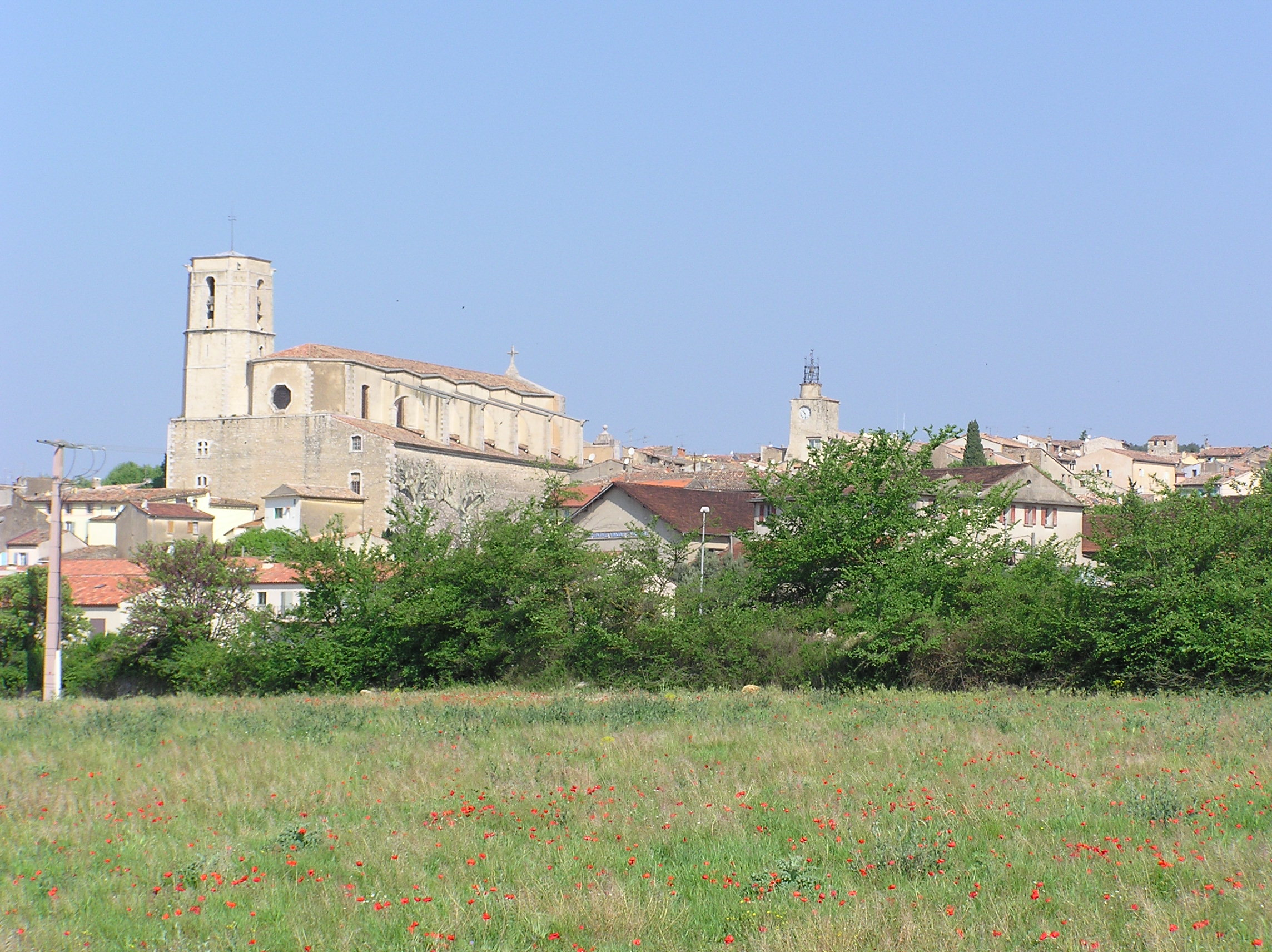 Vue du village de Lorgues (83)